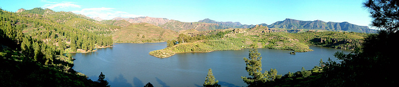 Bildbeschreibung: Gran Canaria, Stausee Presa de las Niñas // Presa Cueva de las Niñas, Tejeda (Gran Canaria) Quelle: selbst fotografiert Fotograf/Zeichner: --Eckhard Jakob 13:52, 16. Jan 2006 (CET) Datum: 01.02.2006 andere Versionen: hohe Auflösung auf Anfrage